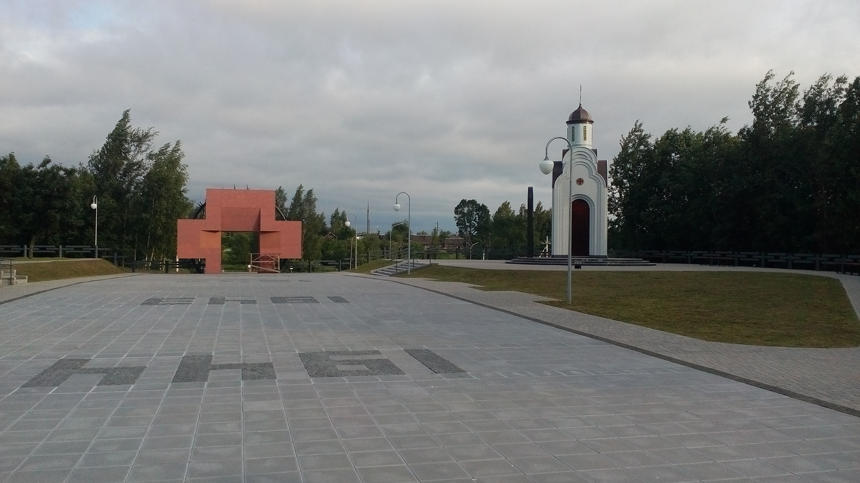 21 июня 2020